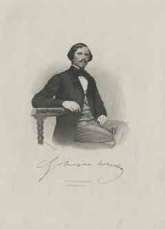 Gustav Freiherr von Meyern-Hohenberg